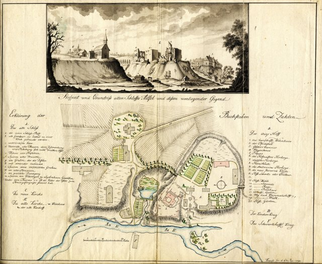 Scan from Johann Christoph Brotze's book Sammlung verschiedner Liefländischer Monumente. Prospect und Grundriss alten Schlosses Adsel und dessen umliegender Gegend. 1790. [J. W. Krause; die Ansicht; der Plan].